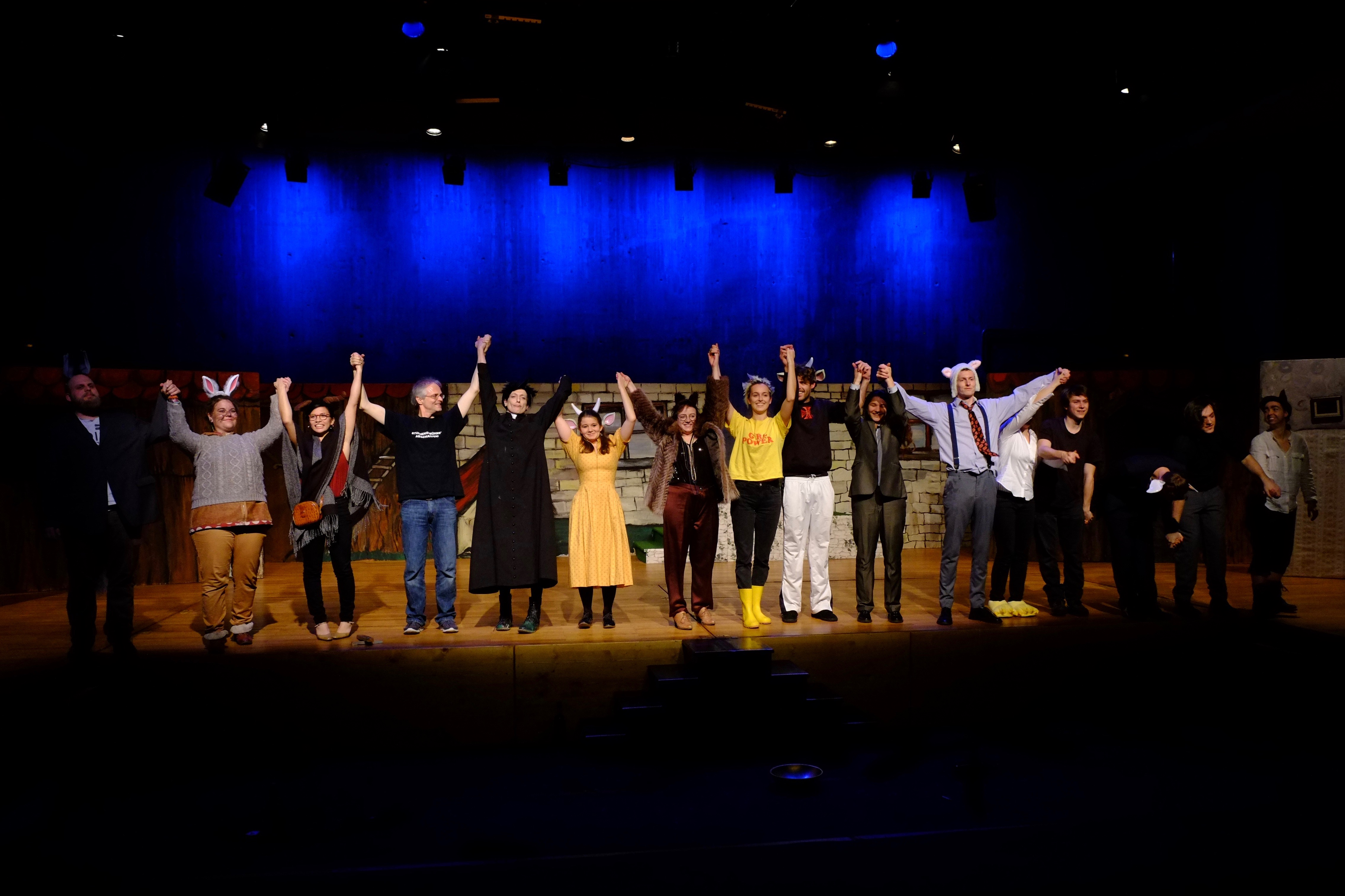 Schlussverbeugung aus der Inszenierung "Animal Farm der Demokratie" des ueTheaters Regensburg, Ort: Elly Maldaque Theater an der Uni, Datum: 09.12.2018